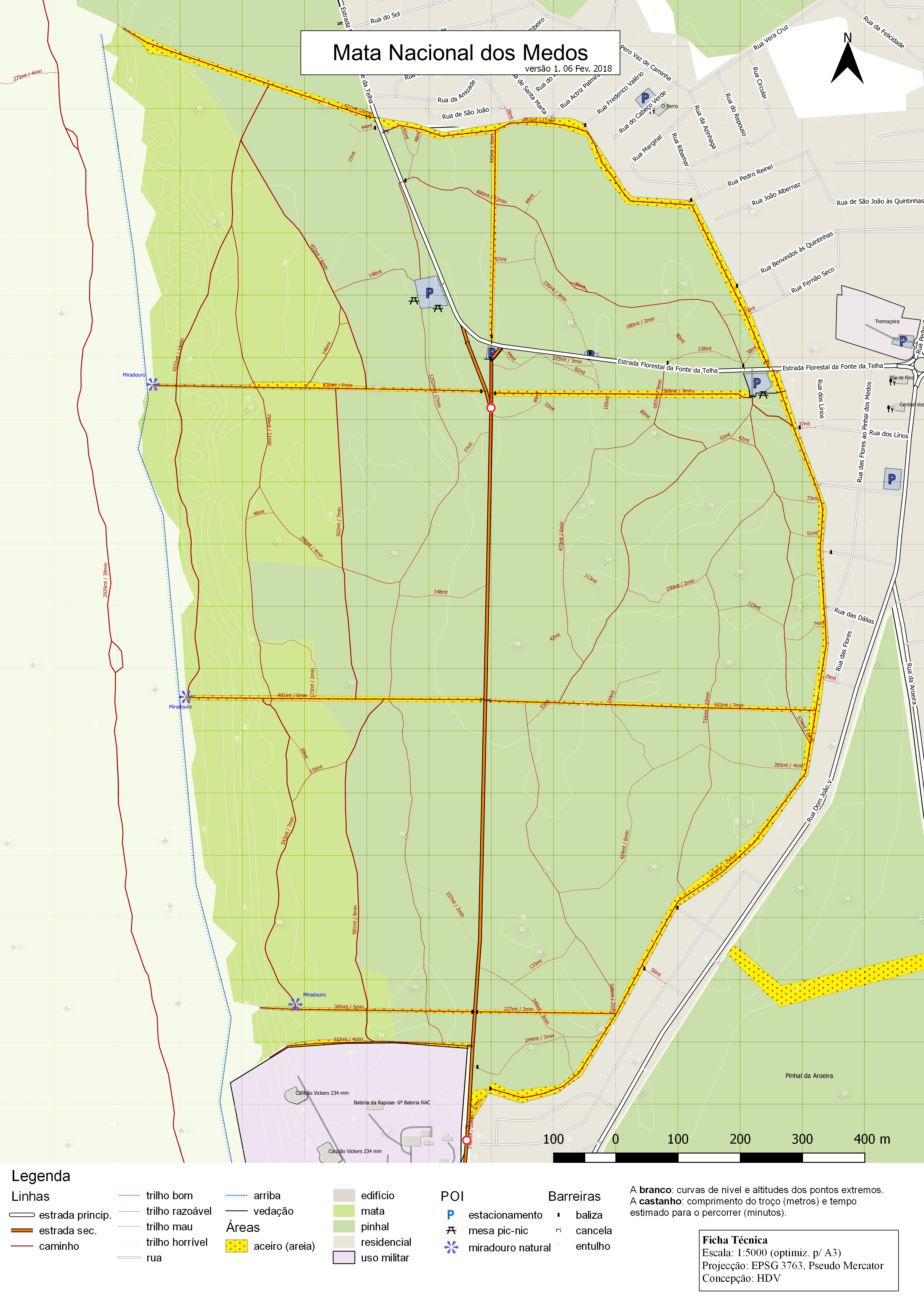 Mapa detalhado dos percursos e pontos de interesse na Mata Nacional dos Medos.